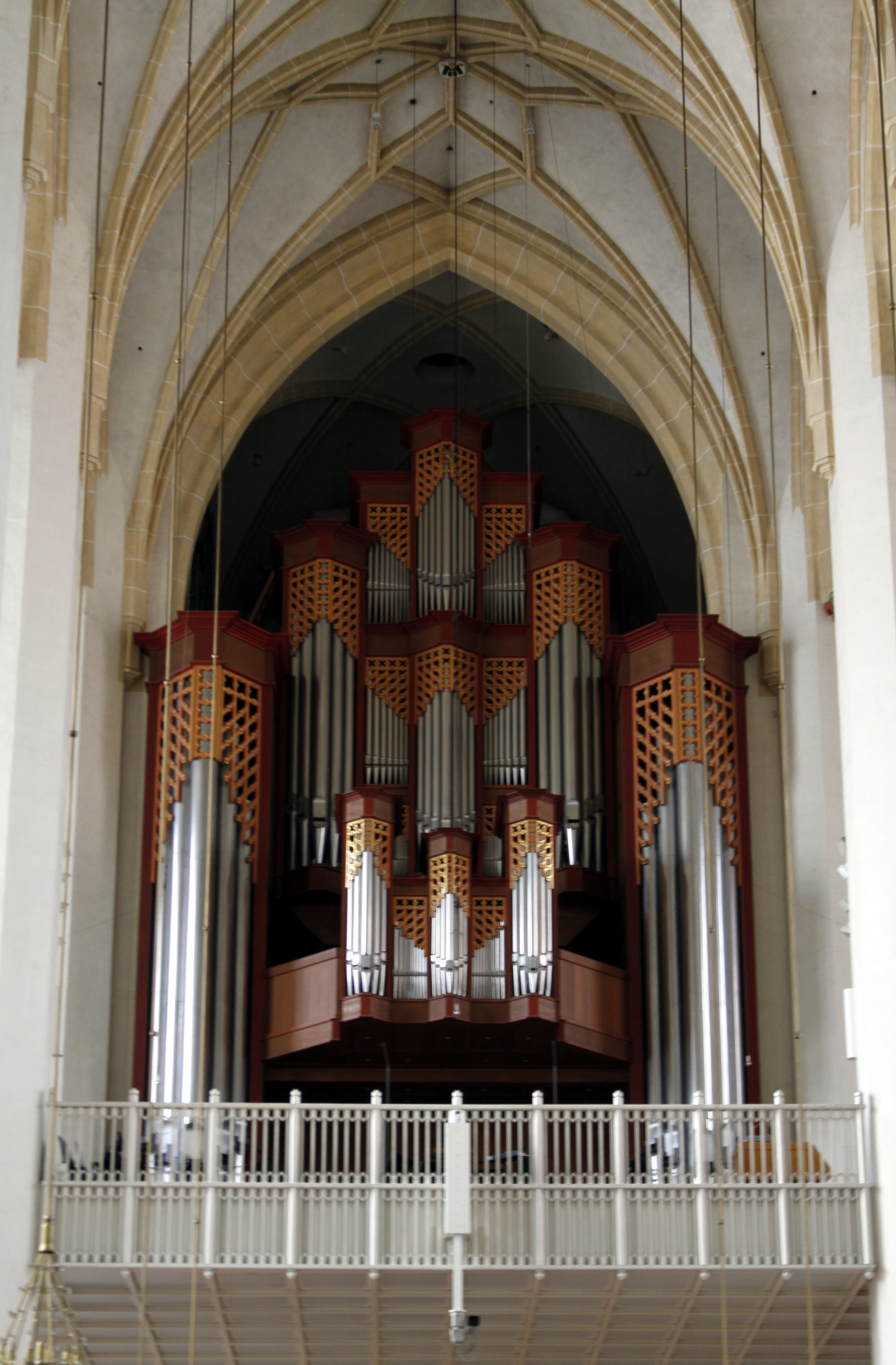 Frauenkirche - Munich - Germany